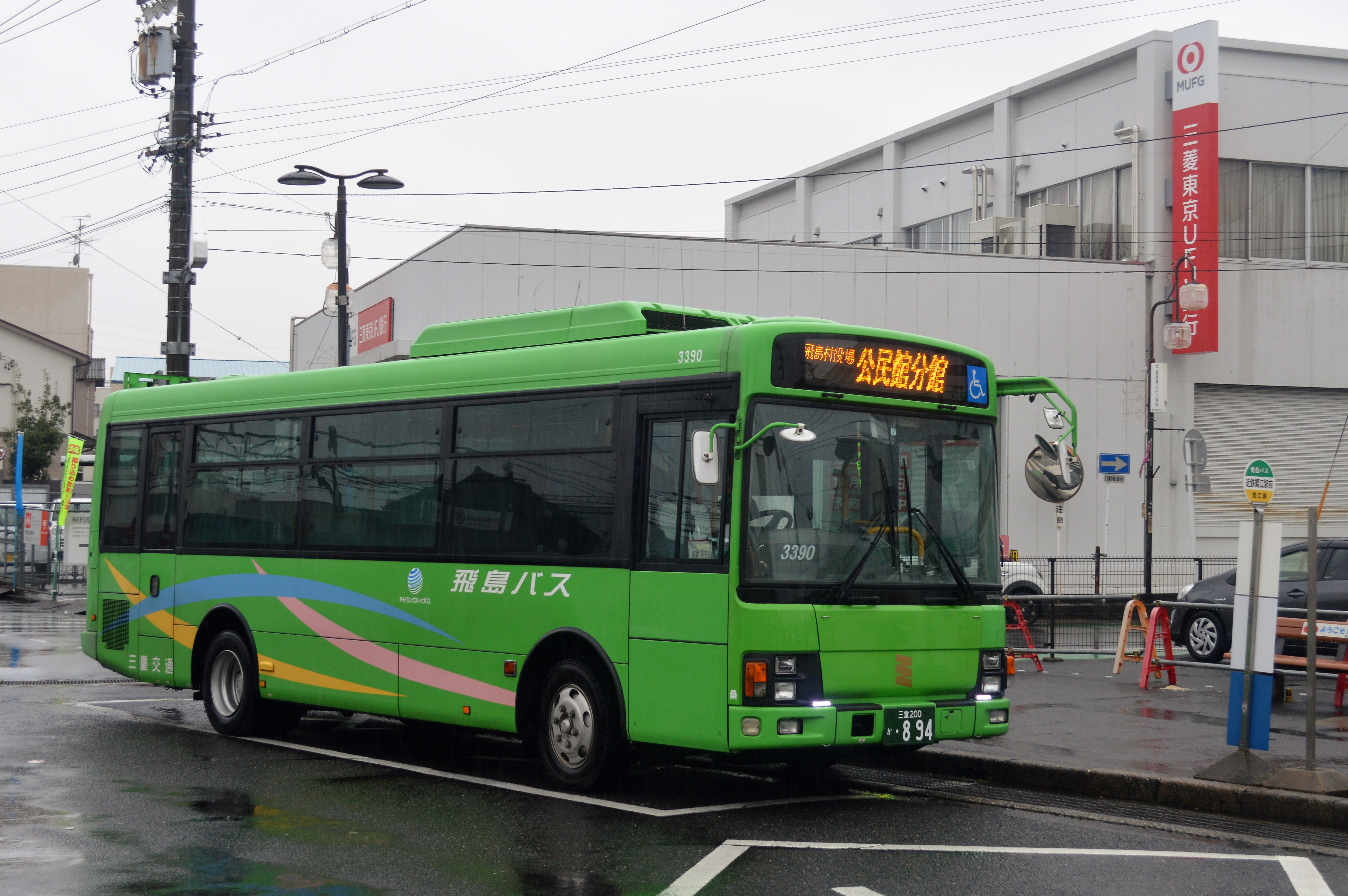 愛知県海部郡飛島村の飛島公共交通バス。別自治体の近鉄蟹江駅にあるバス停。